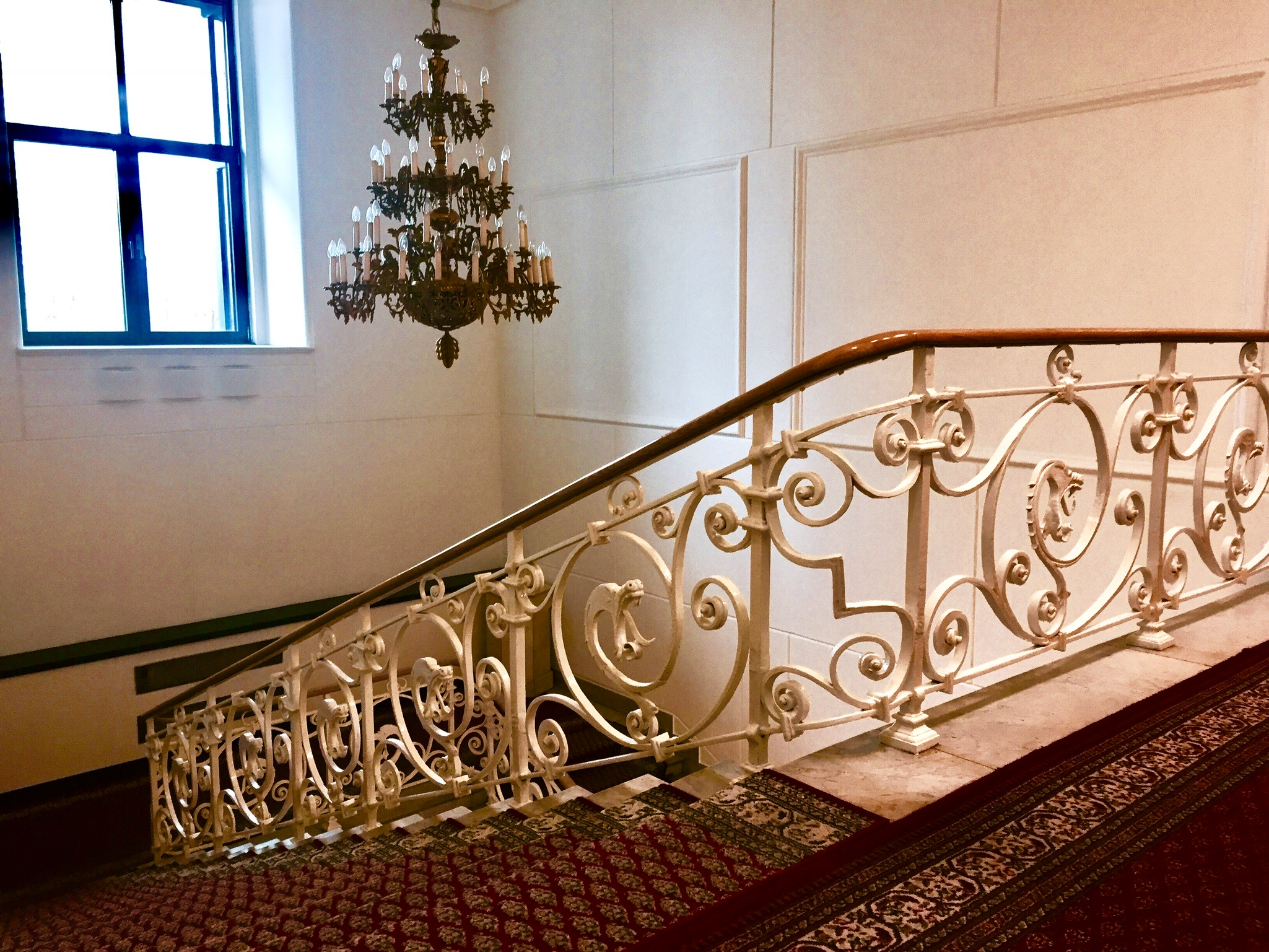 Zabytkowa klatka schodowa Domu Towarzystwa ubezpieczeniowego "Rosja" przy ulicy Marszałkowskiej w Warszawie.